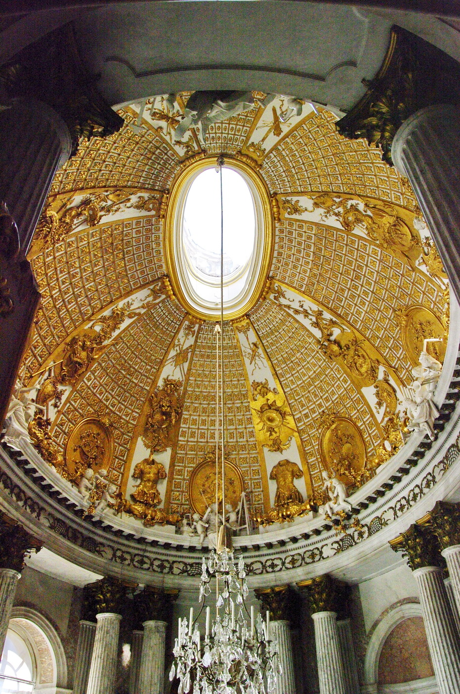 Kuppel Marmorsaal Schloss Sanssouci, Potsdam